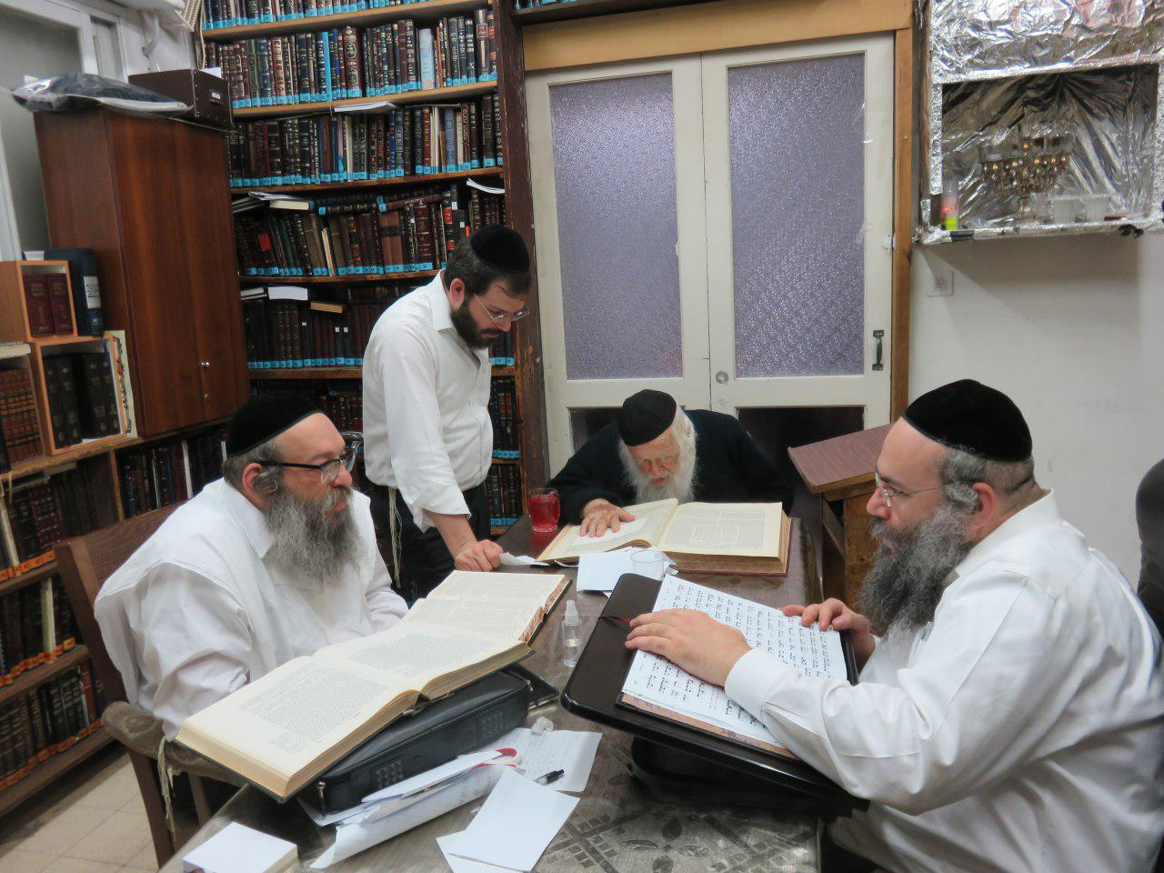 הרב חיים קניבסקי עם בניו